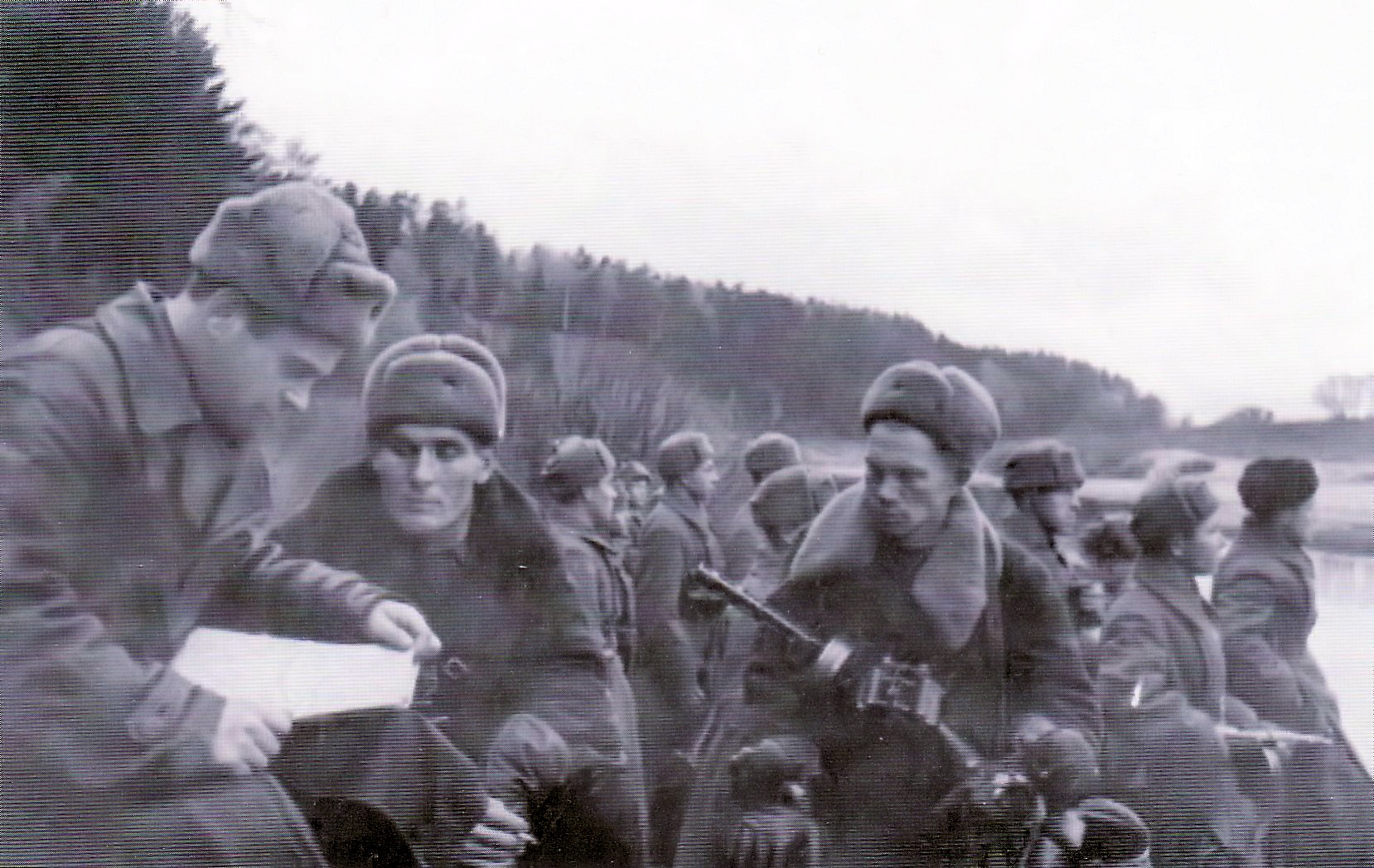 Под Юхновым, октябрь 1941 года. На переднем плане капитан И.Г. Старчак, старший политрук Н. Х. Щербина и лейтенант Н. Н. Сулимов.